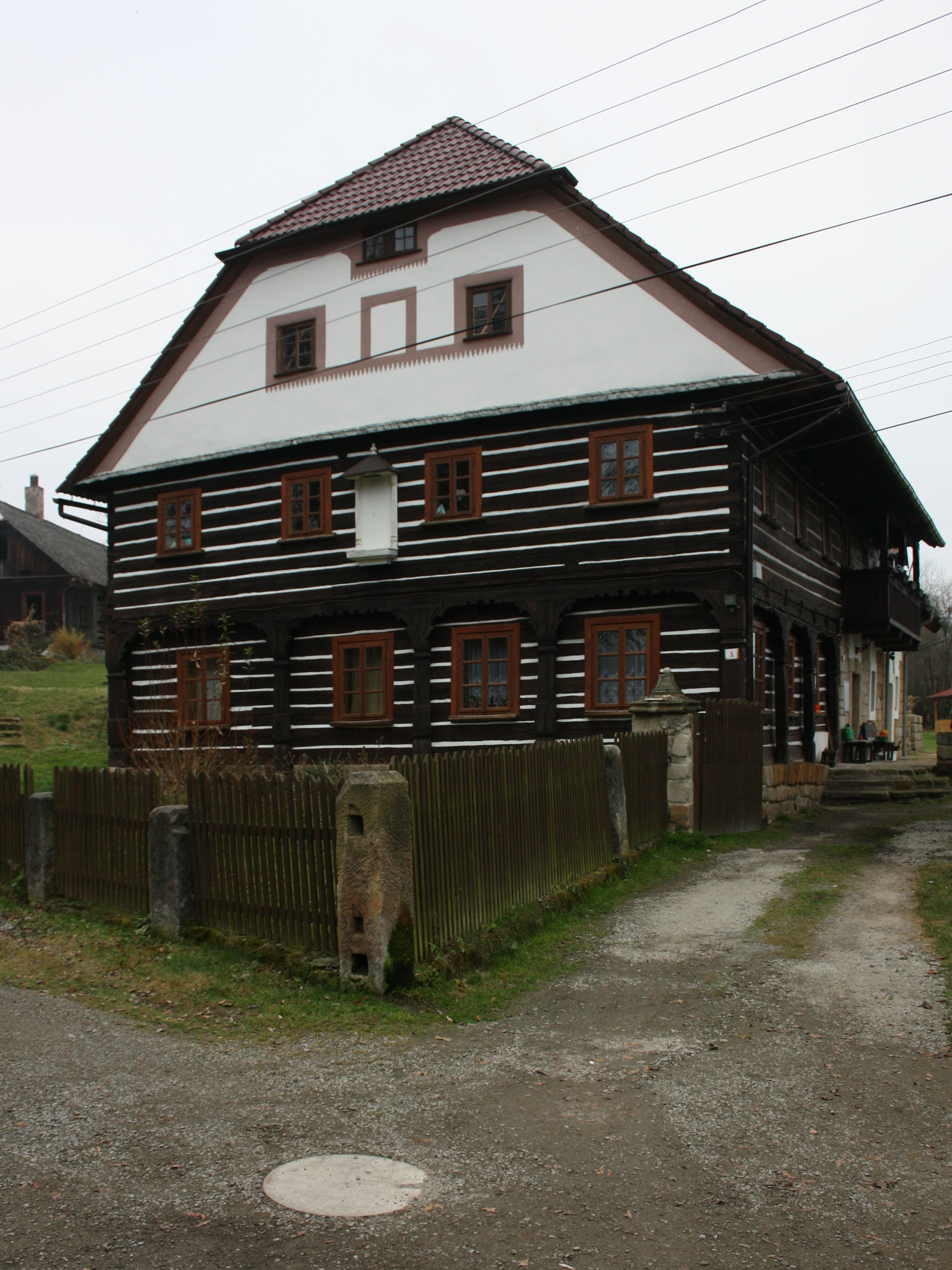 Újezd (Jestřebí) - roubený dům s podstávkou